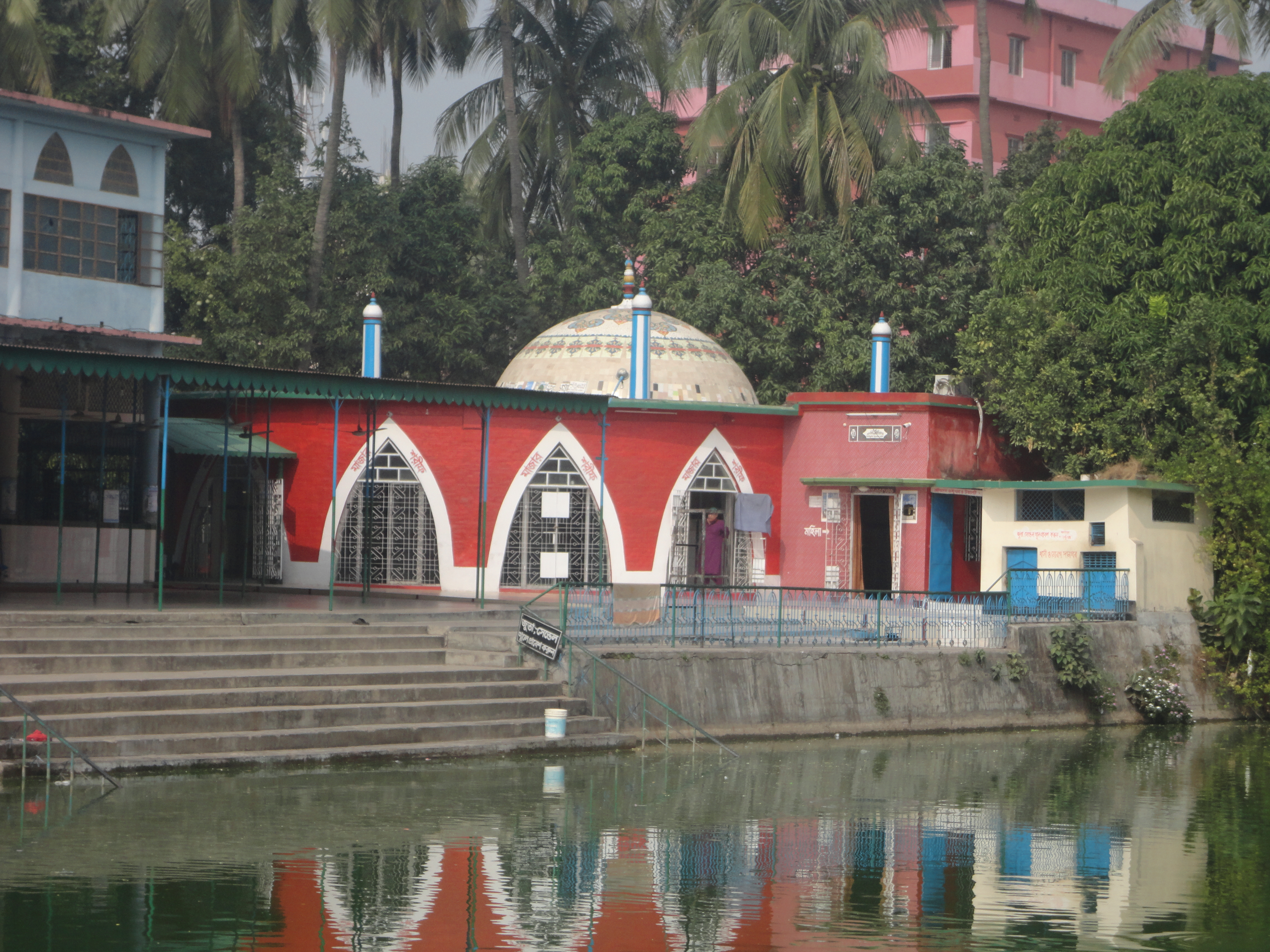 শাহ মখদুম রূপোশের মাজার